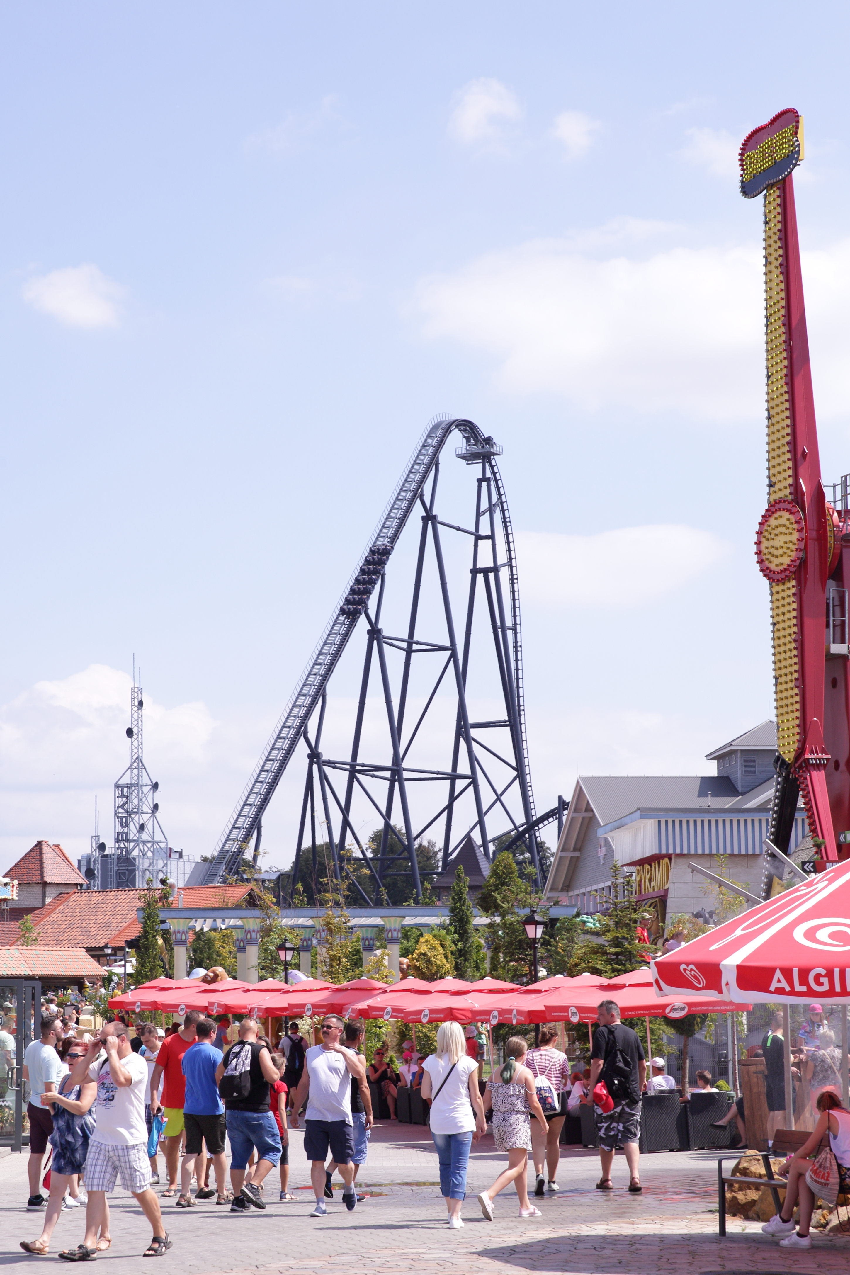 Główne wzniesienie stalowej kolejki górskiej Hyperion w parku Energylandia w Zatorze.